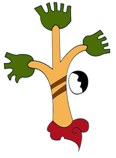 Escudo del municipio de Ocuituco